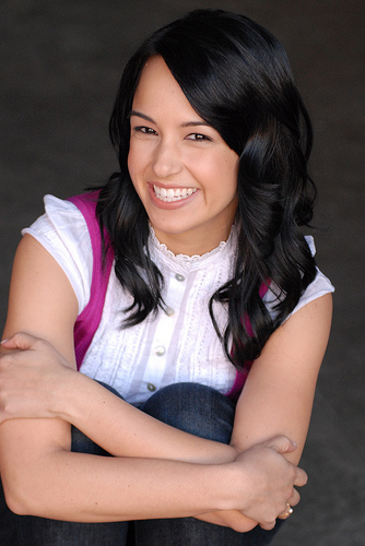 Natali Del Conte